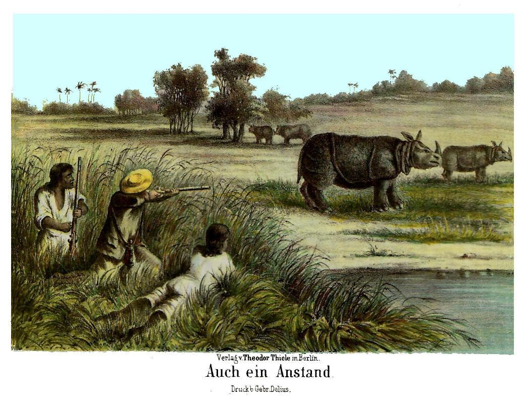 Javan Rhino "Auch ein Anstand", from Zimmermann, Der Vulcanismus oder das Todesthal auf Java.